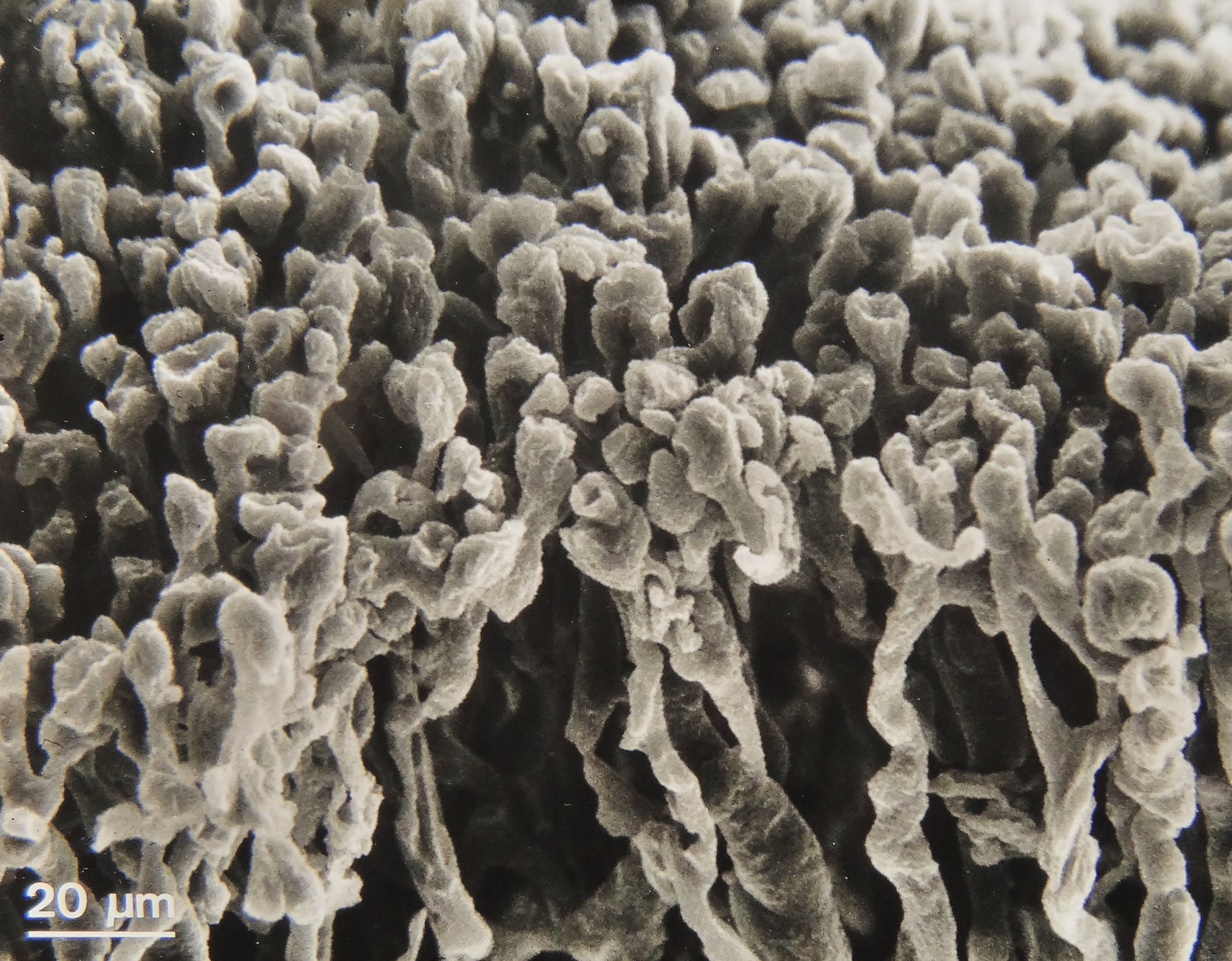 In die Epihysenfuge sprossendes Blutkapillar-Labyrinth beim Längenwachstum eines Knochens. Raster-elektronenmikroskopische Aufnahme eines Injektionspräparates